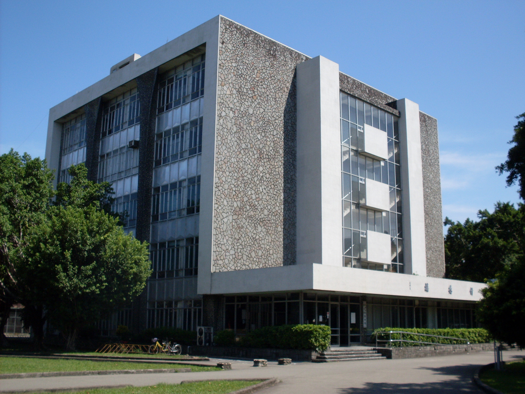 輔大理工暨外語圖書館